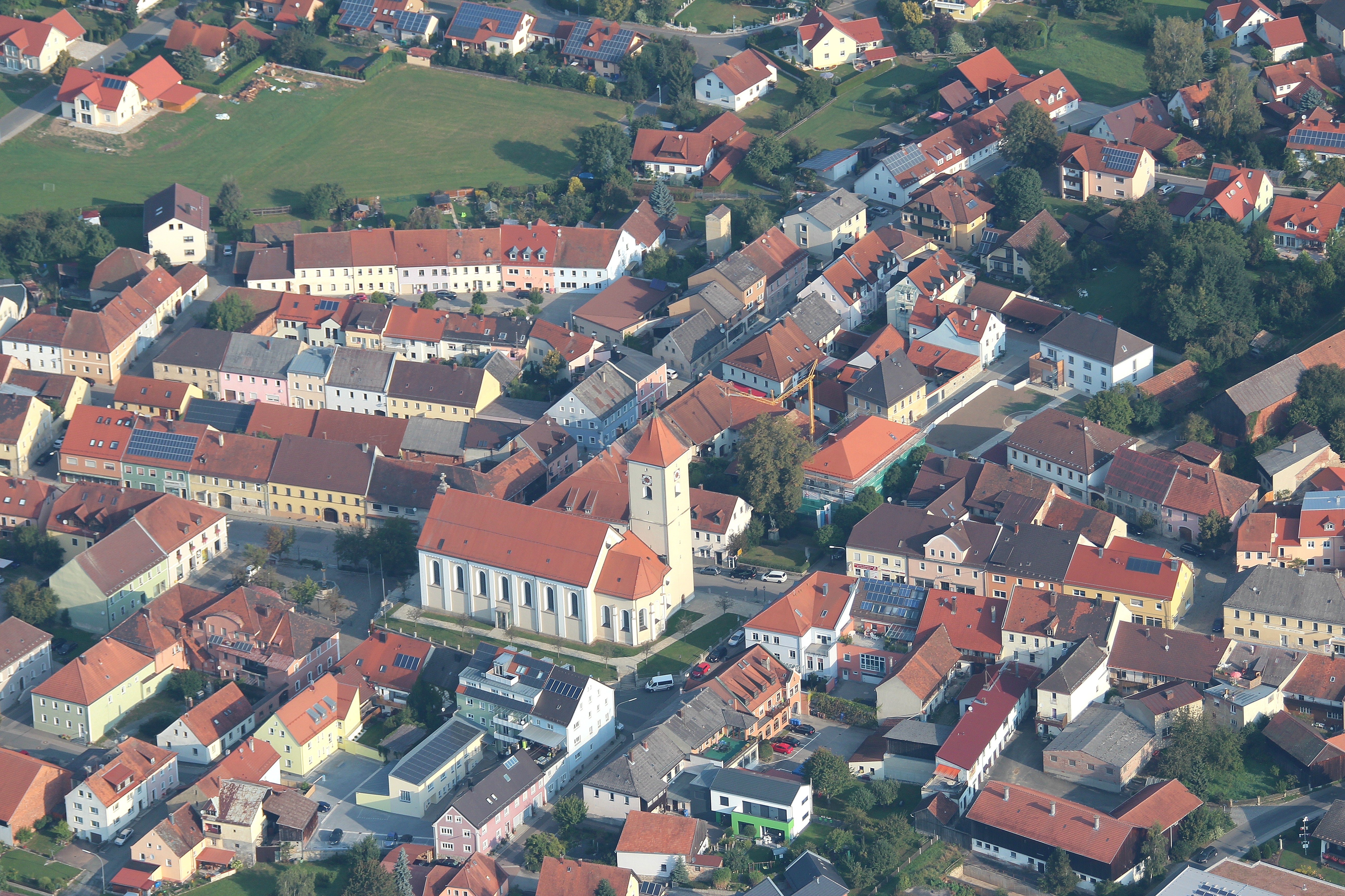 Ortskern von Rötz mit Stadtpfarrkirche St. Martin; Landkreis Cham, Oberpfalz, Bayern